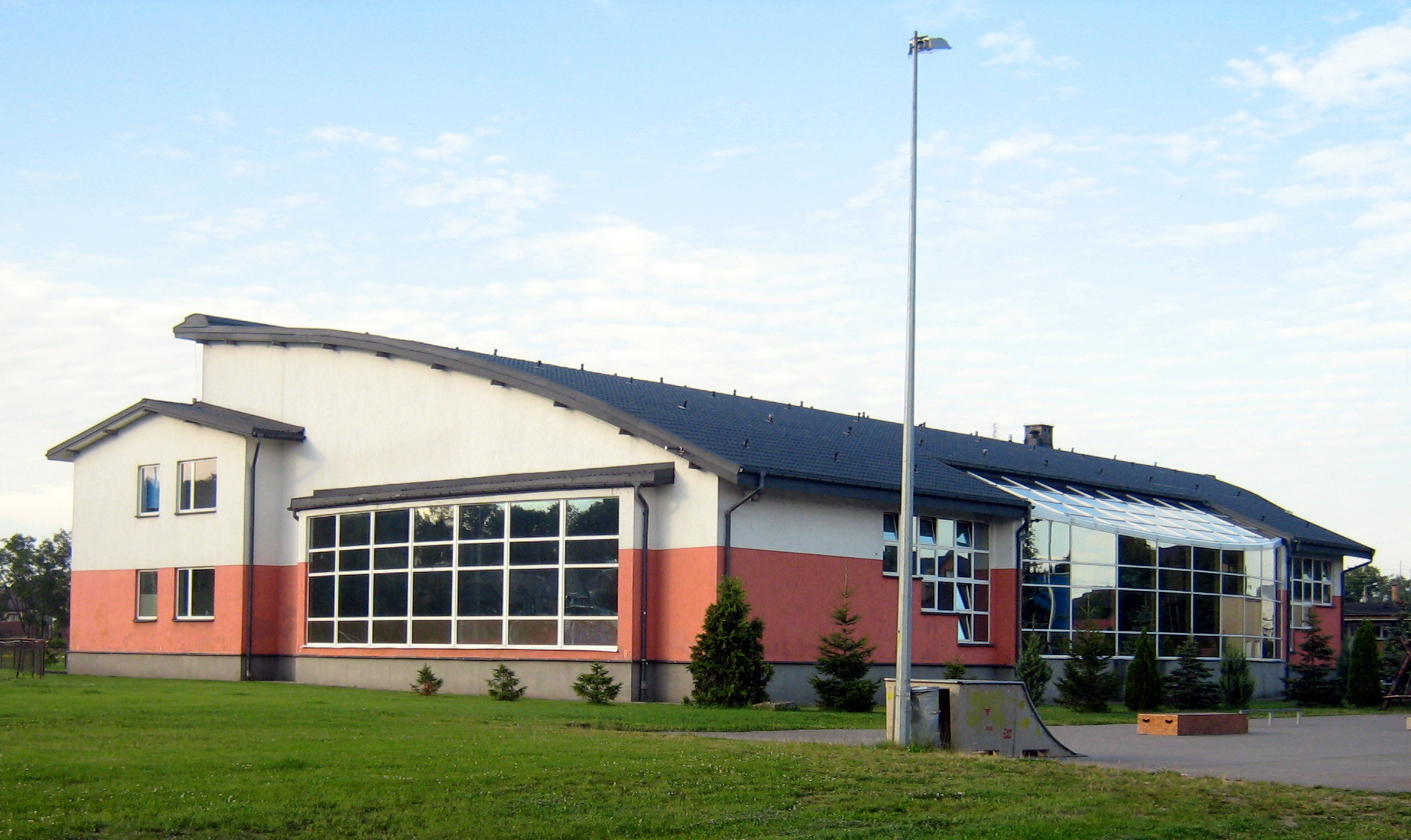 Kryta pływalnia w Sokółce.